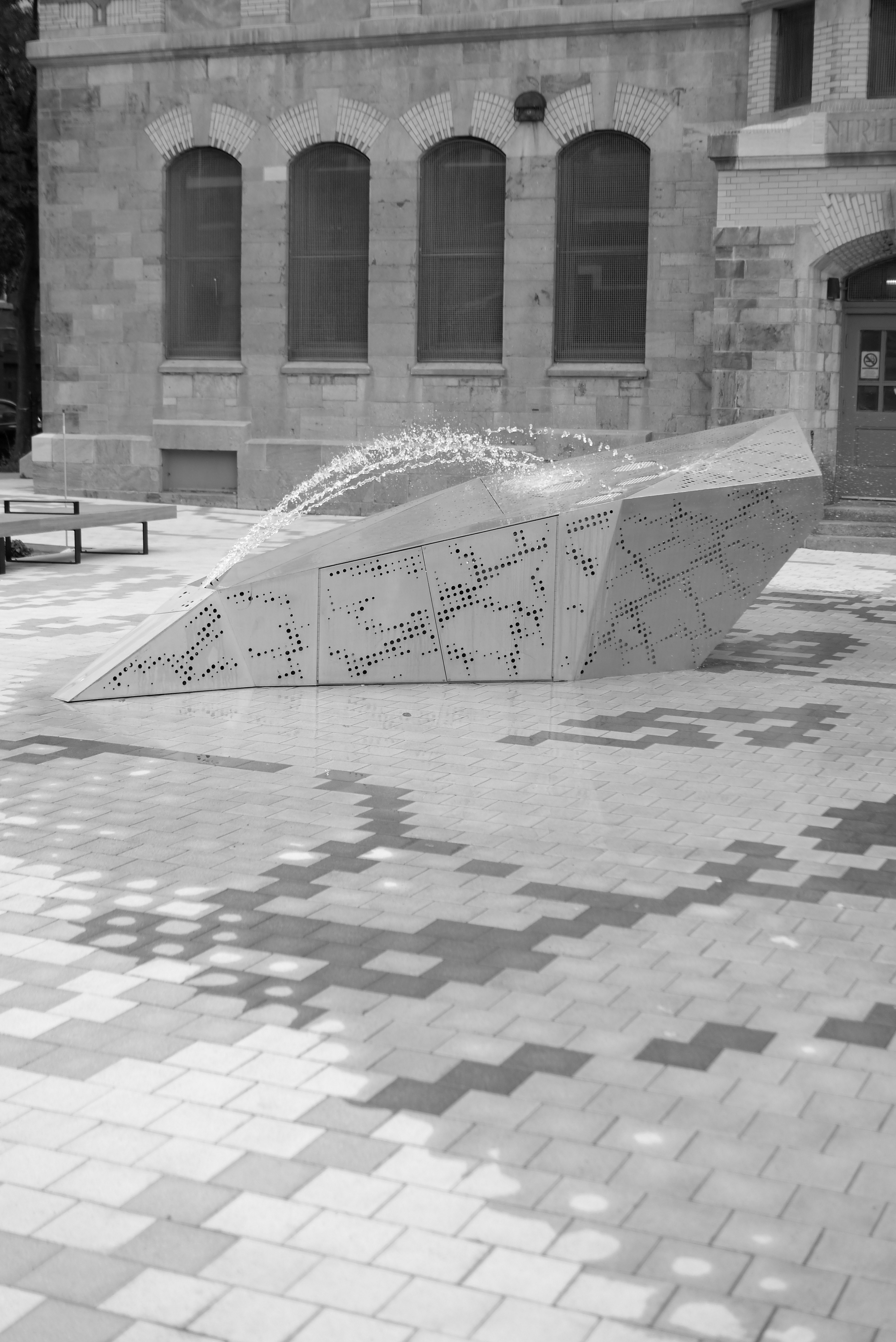 rue Ontario, Montréal Projet d’une nouvelle place publique qui s’inscrit dans un important mouvement de revitalisation du quartier Ste-Marie. La place fait office de parvis au bâtiment du Centre Gédéon-Ouimet de la CSDM et établit une liaison avec le bâtiment de la JTI-MacDonald Corp y faisant face sur la rue Ontario Est. Inspirée de l’engouement de verdissement du quartier, la place minérale intègre deux grandes pochettes densément plantées de grands arbres conçues pour gérer le drainage des eaux de surface. Le motif au sol de feuilles géantes prends au centre de la place une 3e dimension en devenant une fontaine rétro-éclairée.